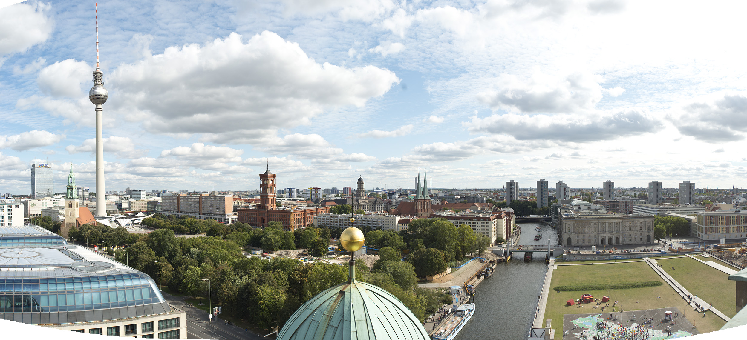 Berlin Panorama